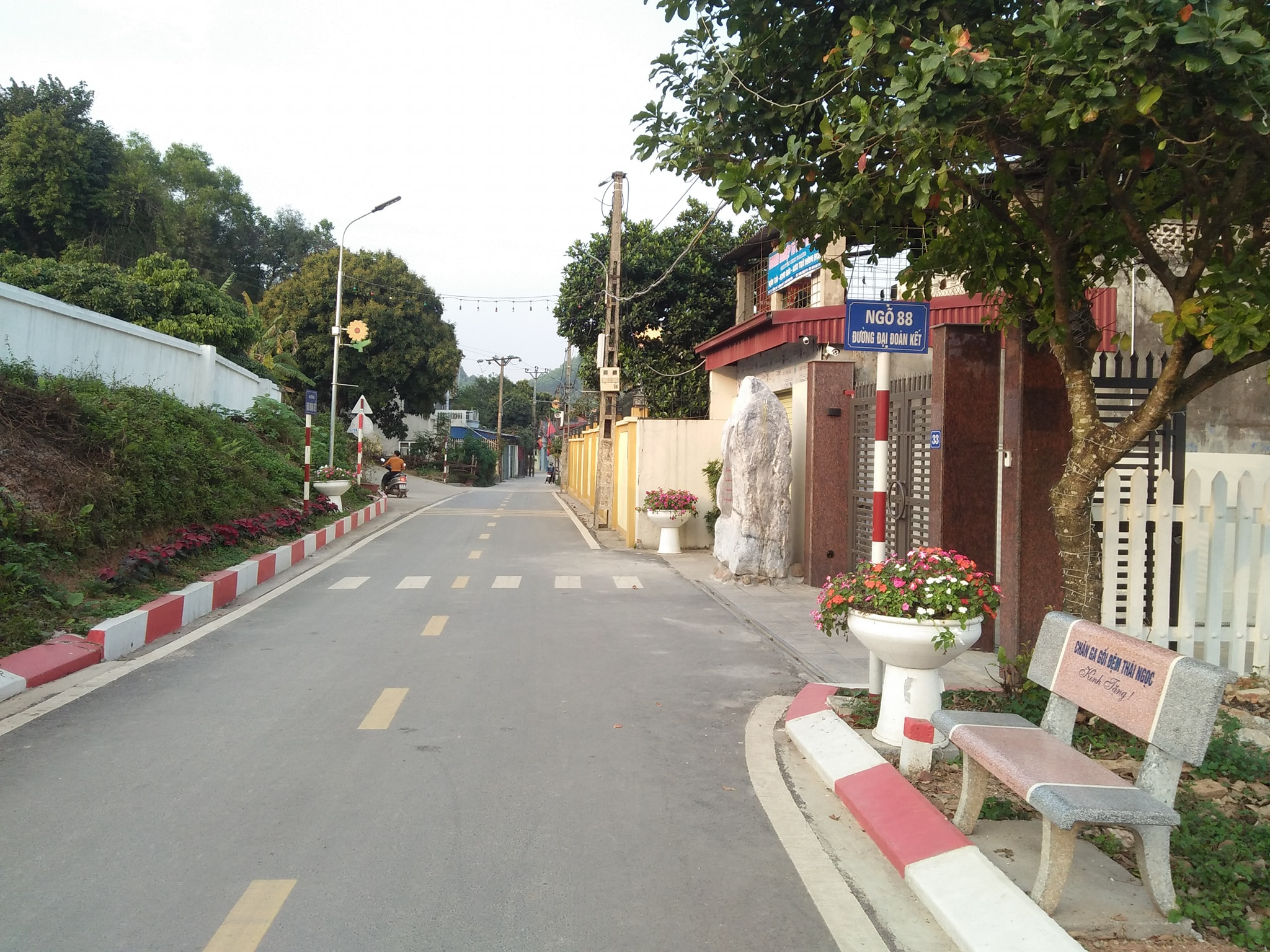 Đường Đại Đoàn Kết, Hóa Thượng, Đồng Hỷ